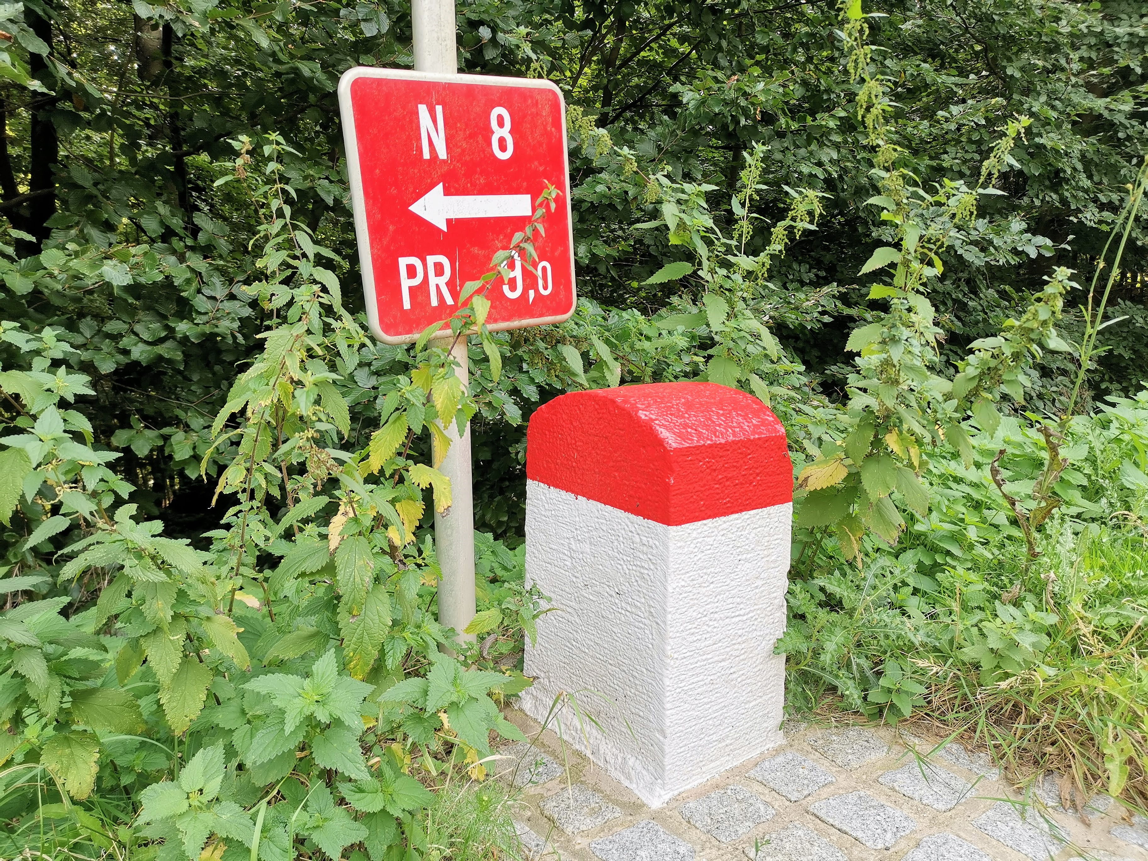 Borne kilométrique (sans indication) et panneau N8 entre Saeul et Kräizerbuch.